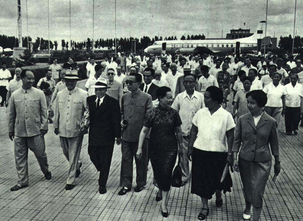 1965-9 1965 李宗仁夫妇返回中国大陆